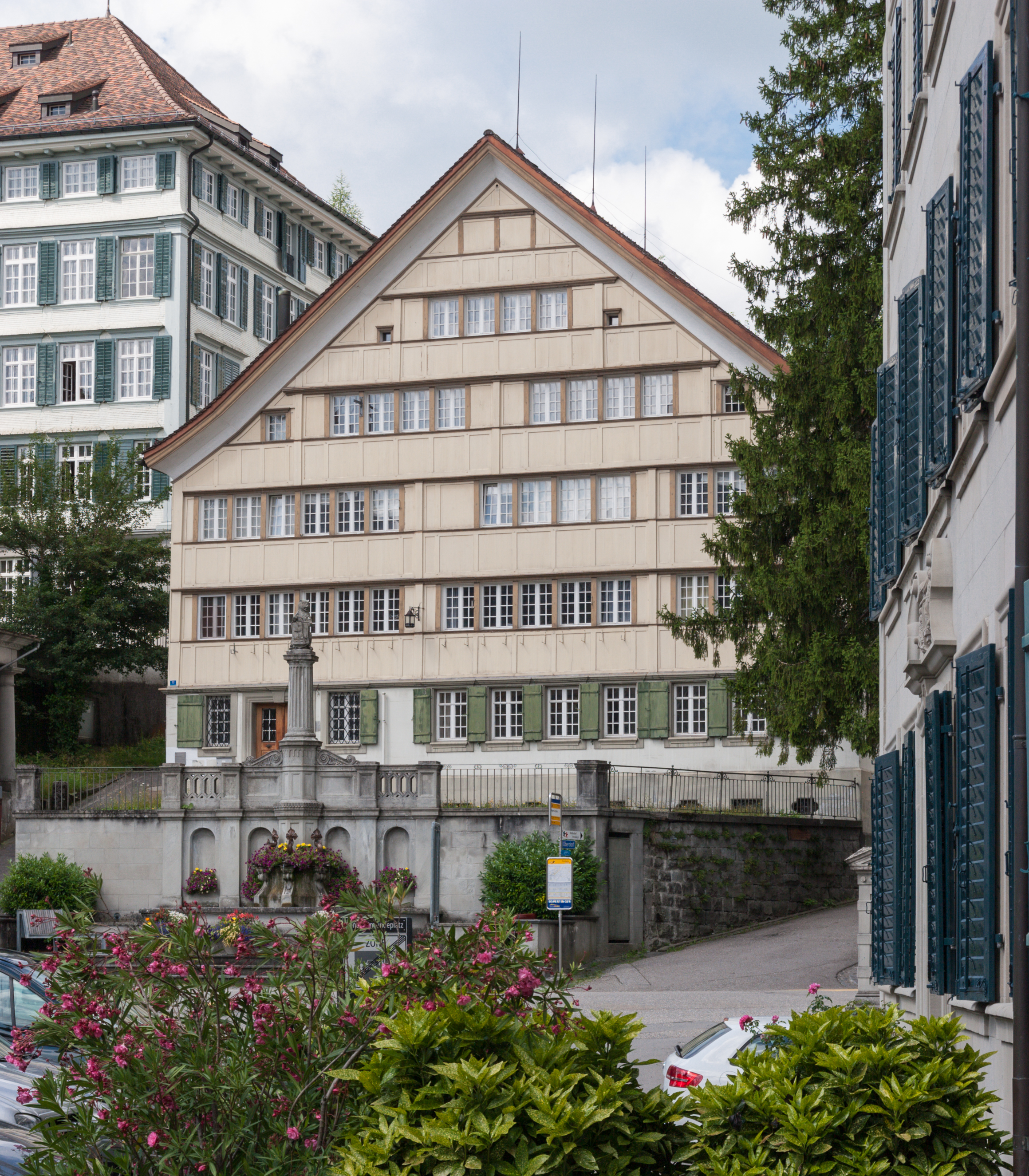 Ehem. Mädchenkonvikt, Haus des Kantonschulvereins Trogen am Landsgemeindeplatz 10 in Trogen AR